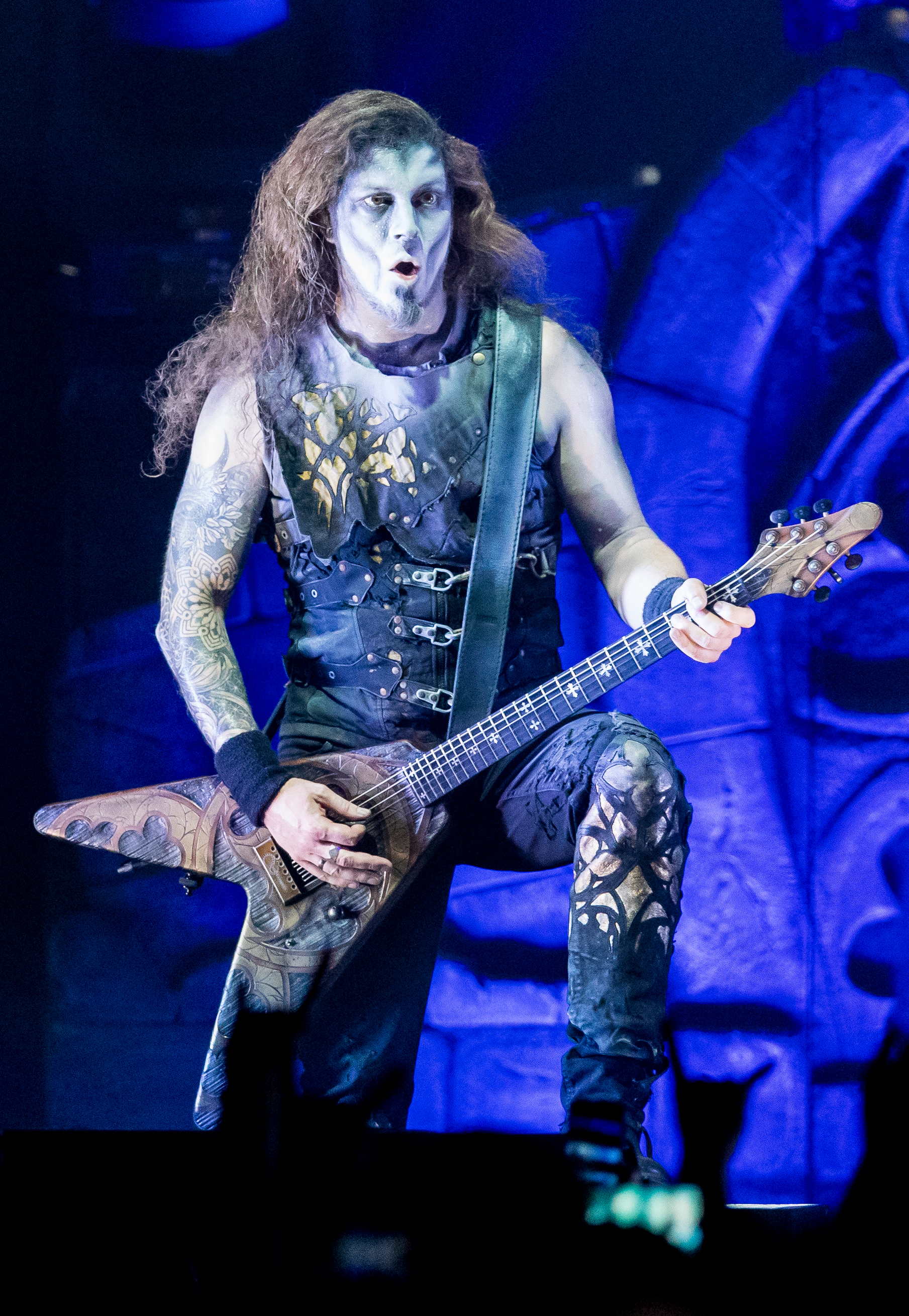 Powerwolf during Zeltfestival Rhein-Neckar ( at Maimarktgelände, Mannheim, Baden-Württemberg, Germany on 2019-06-18, Photo: Sven Mandel Promotion by Delta Konzerte (